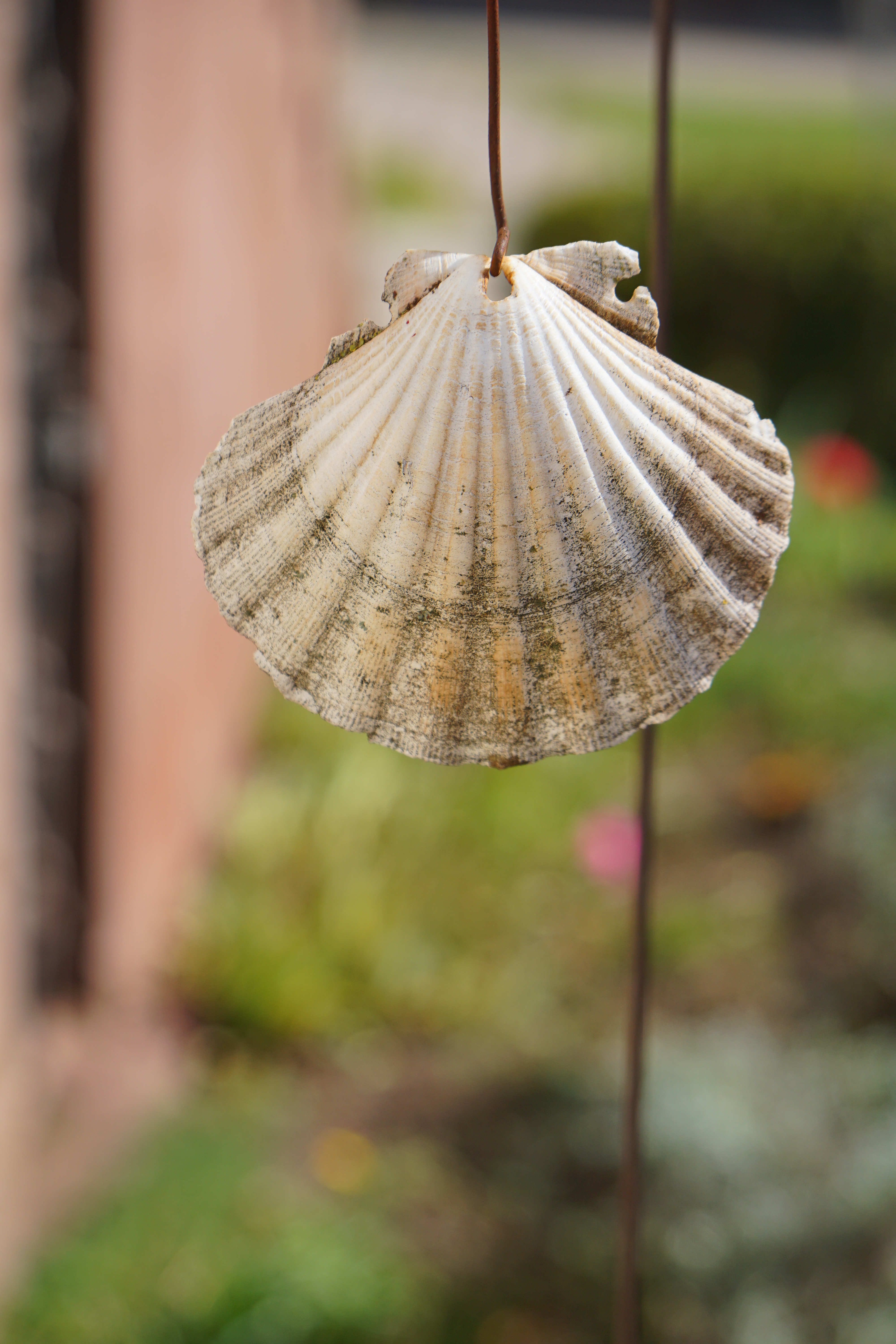 Kloster Kirchberg, Große Pilgermuschel von dem Verwaltungsgebäude.